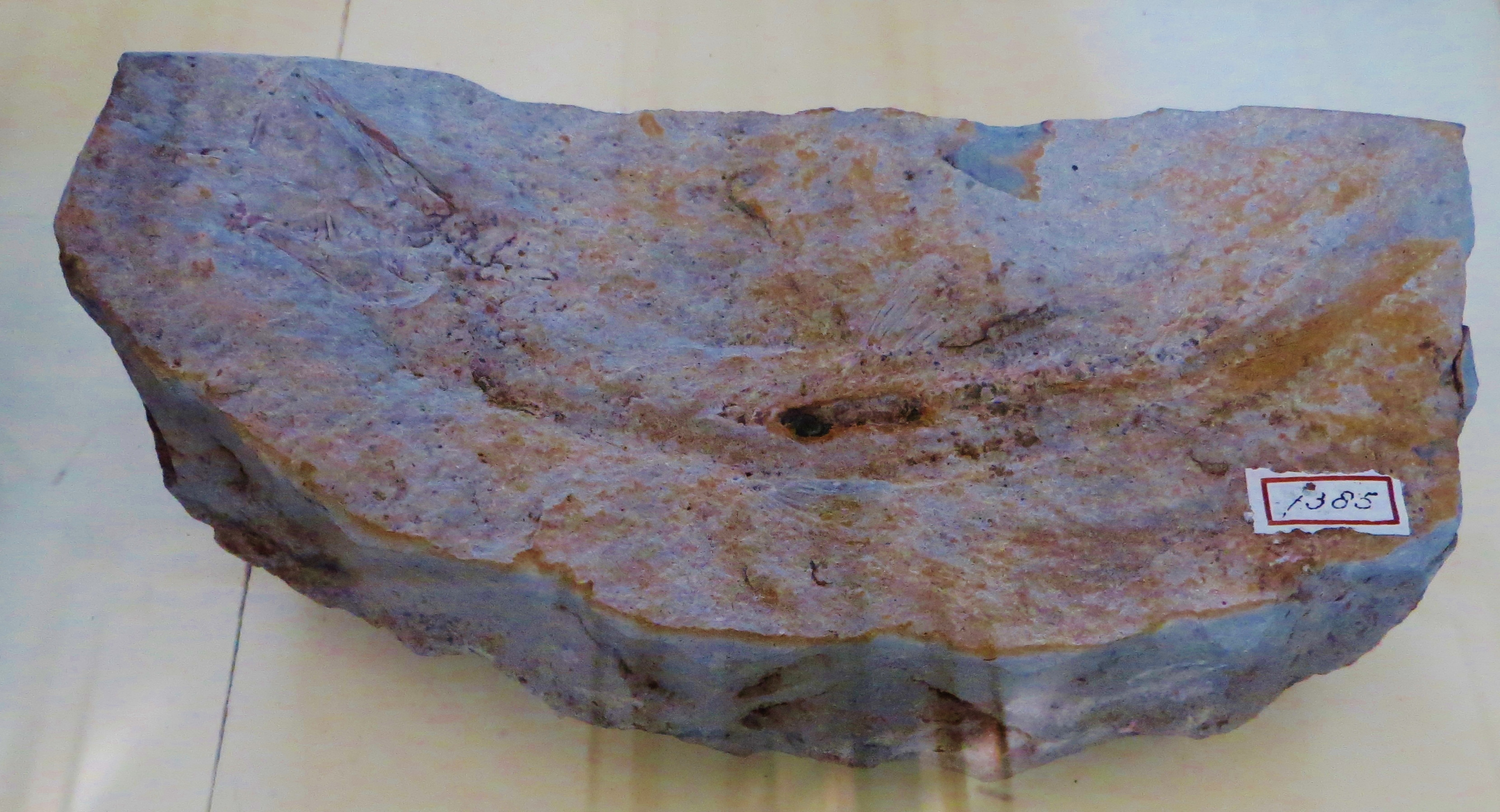 Fossil of Echidnocephalus, an extinct fish- Took the picture at Teylers Museum, Haarlem